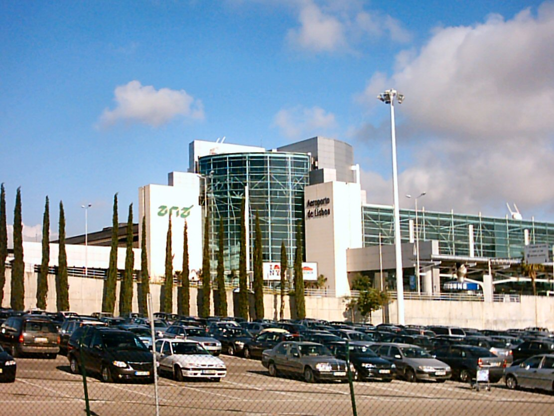 Aeroporto de Lisboa